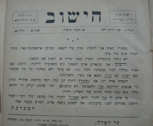 הגליון הראשון של כתב-העת "הישוב"